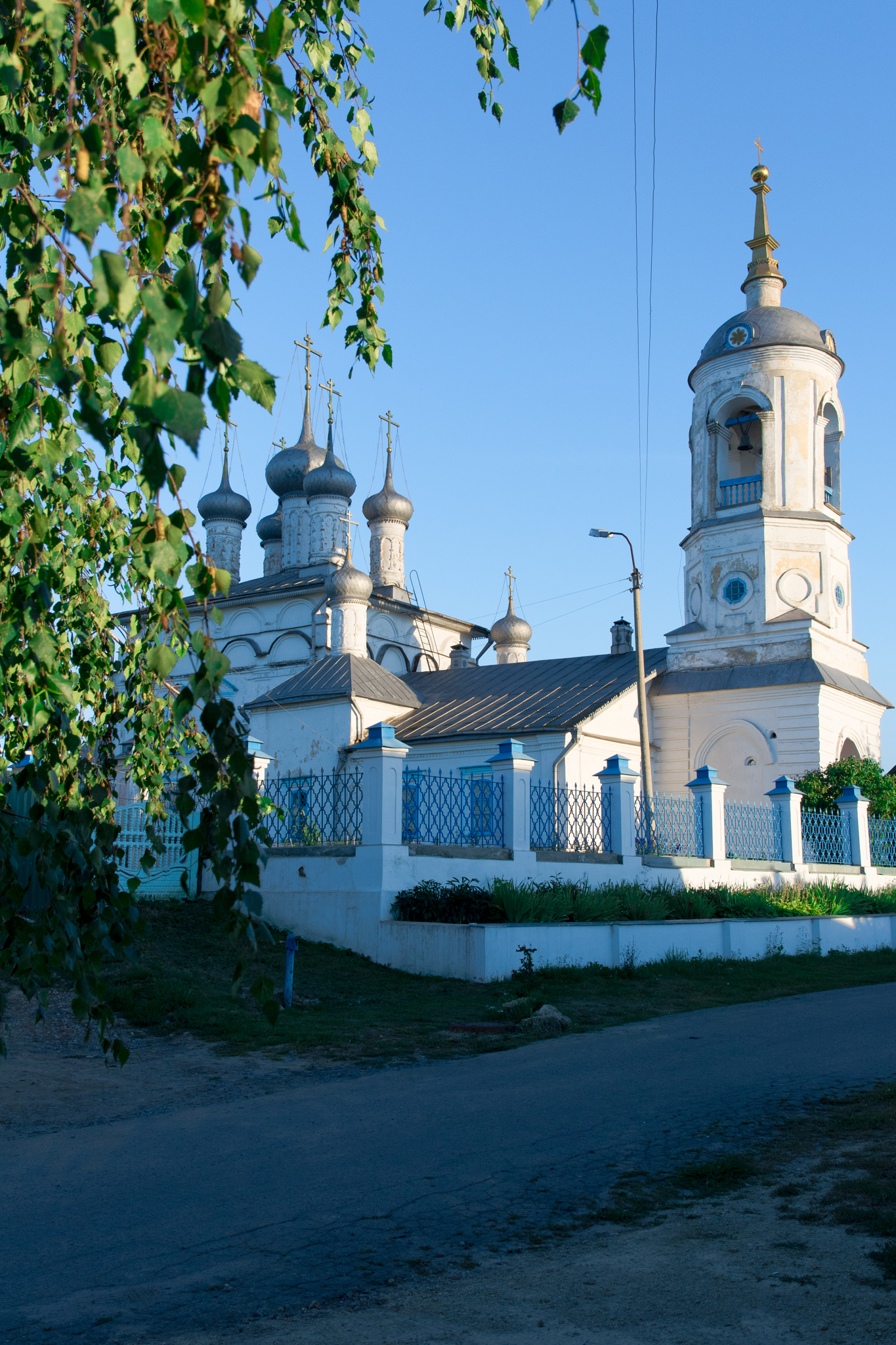 Церковь Введения во храм Пресвятой Богородицы в г. Мценске